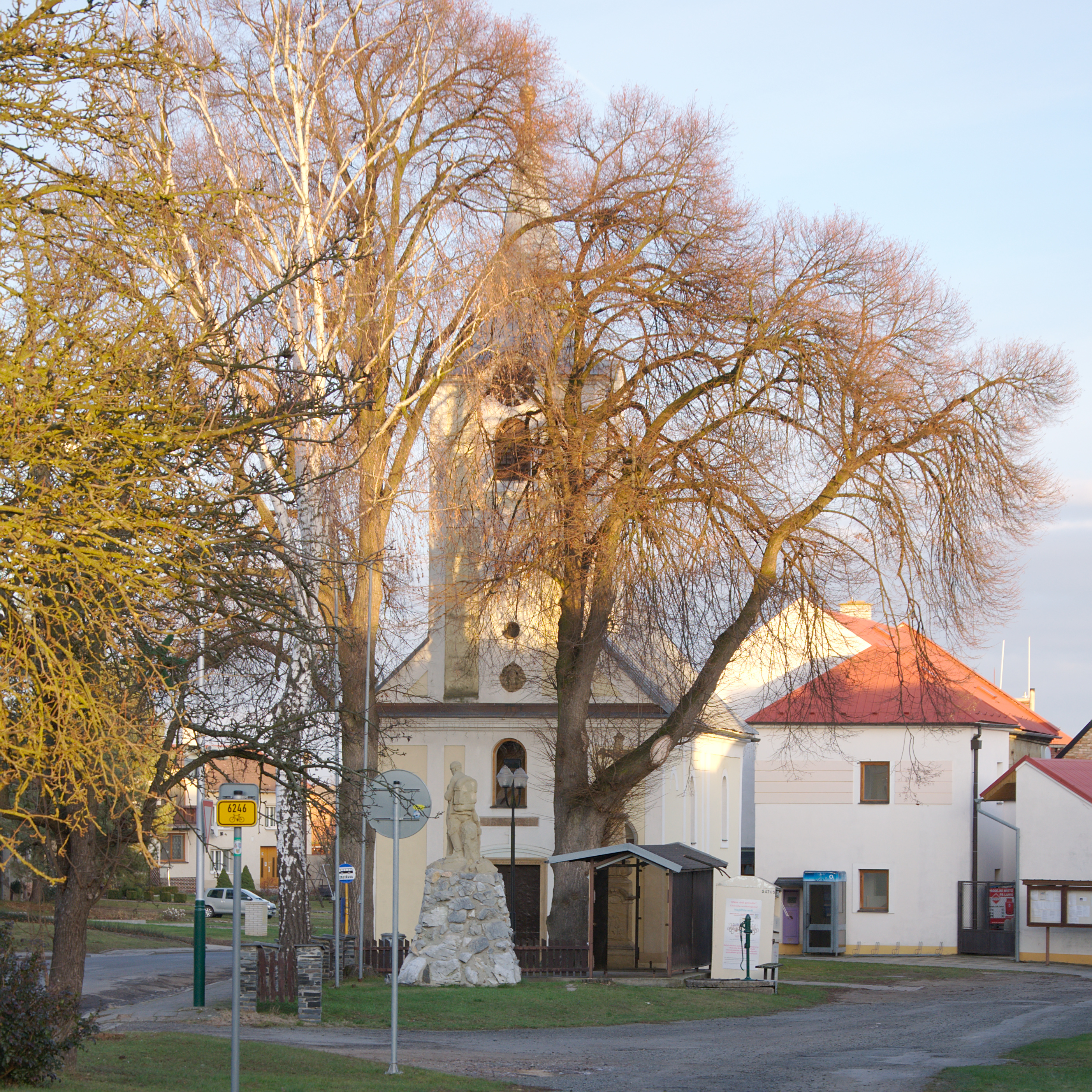 Kaple Andělů Strážných, Senička, okres Olomouc